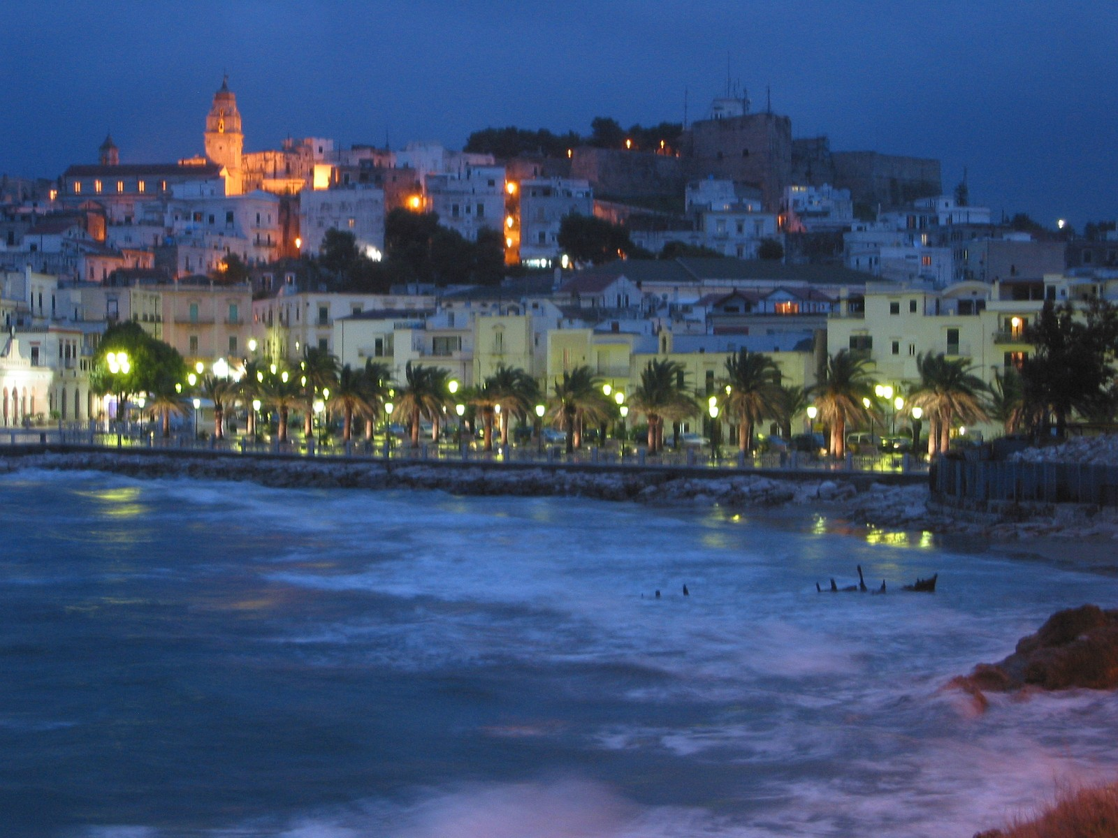 Vieste, Puglia, Italia